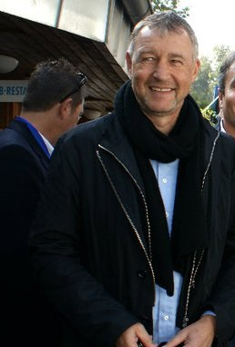 Karl Allgöwer 2010